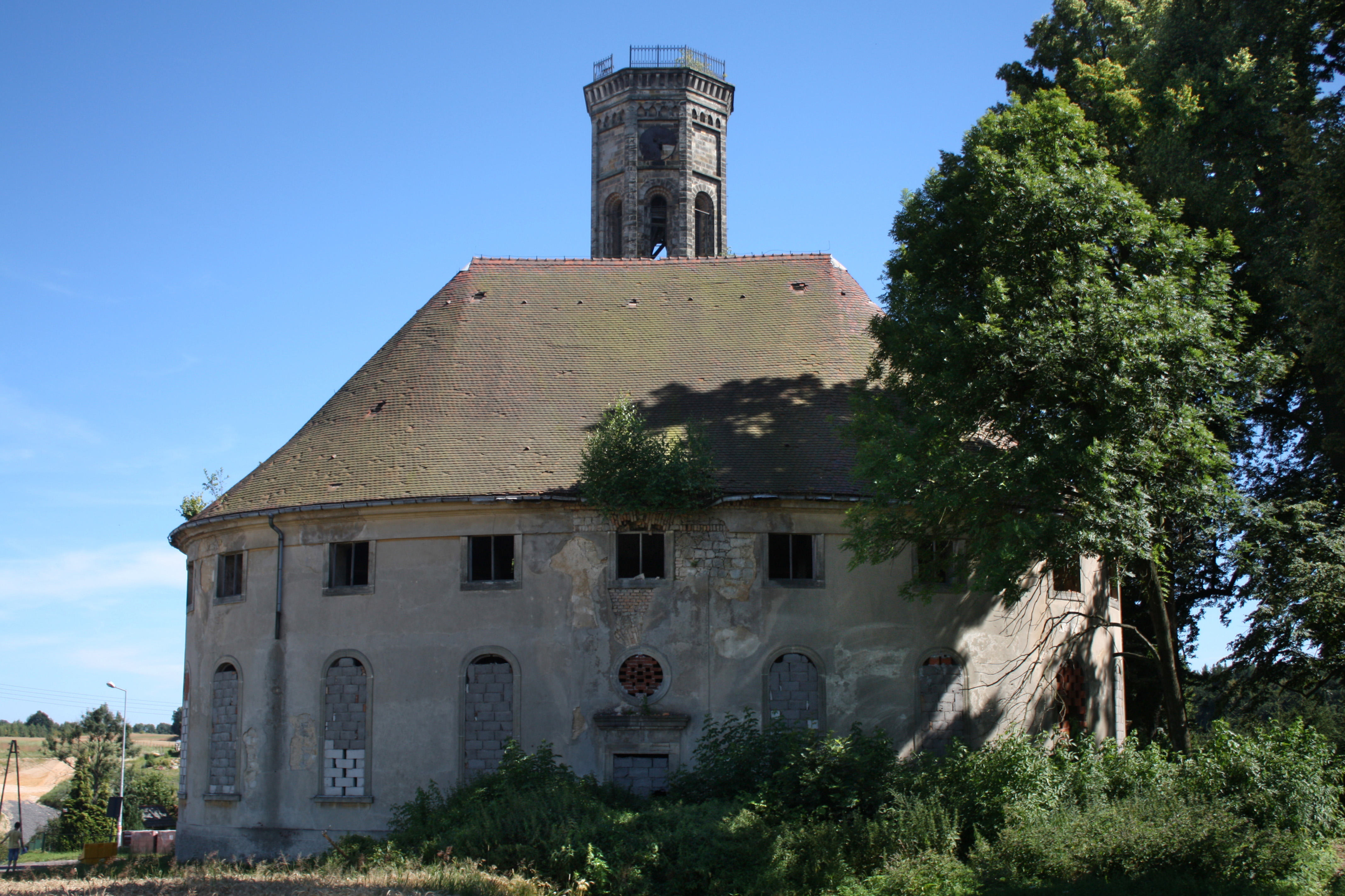 Żeliszów - kościół ewangelicki, 1796-1797, 1873-1877 This photo of Lower Silesian Voivodeship was taken during Wikiexpedition 2013 set up by Wikimedia Polska Association.You can see all photographs in category Wikiekspedycja 2013.